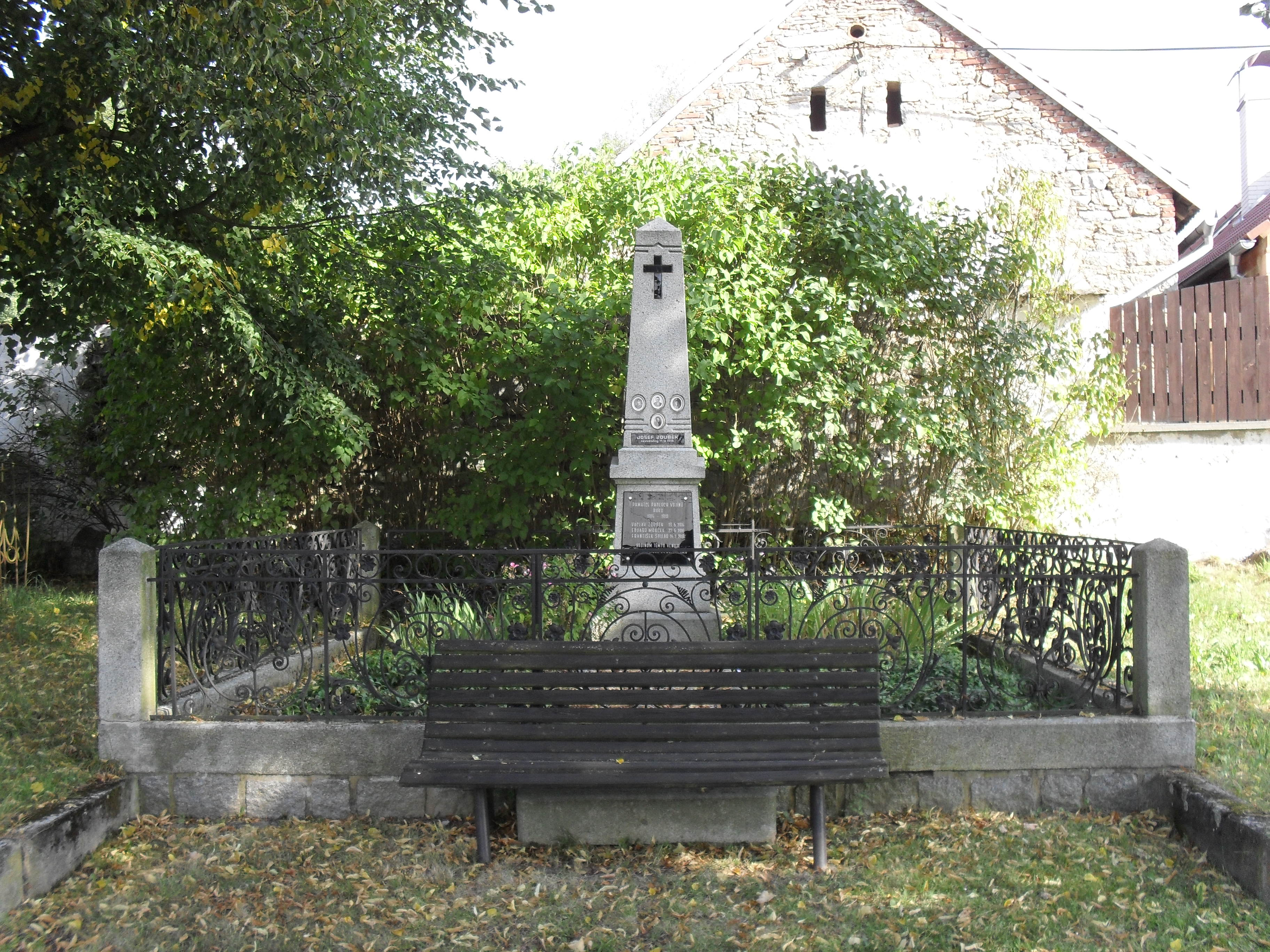 Fotografie pořízena v obci Maňovice.